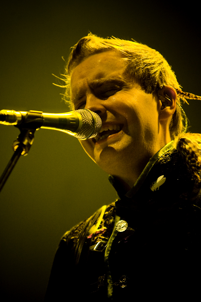 Sigur Rós, No Campo Pequeno, 11 Novembro 2008.